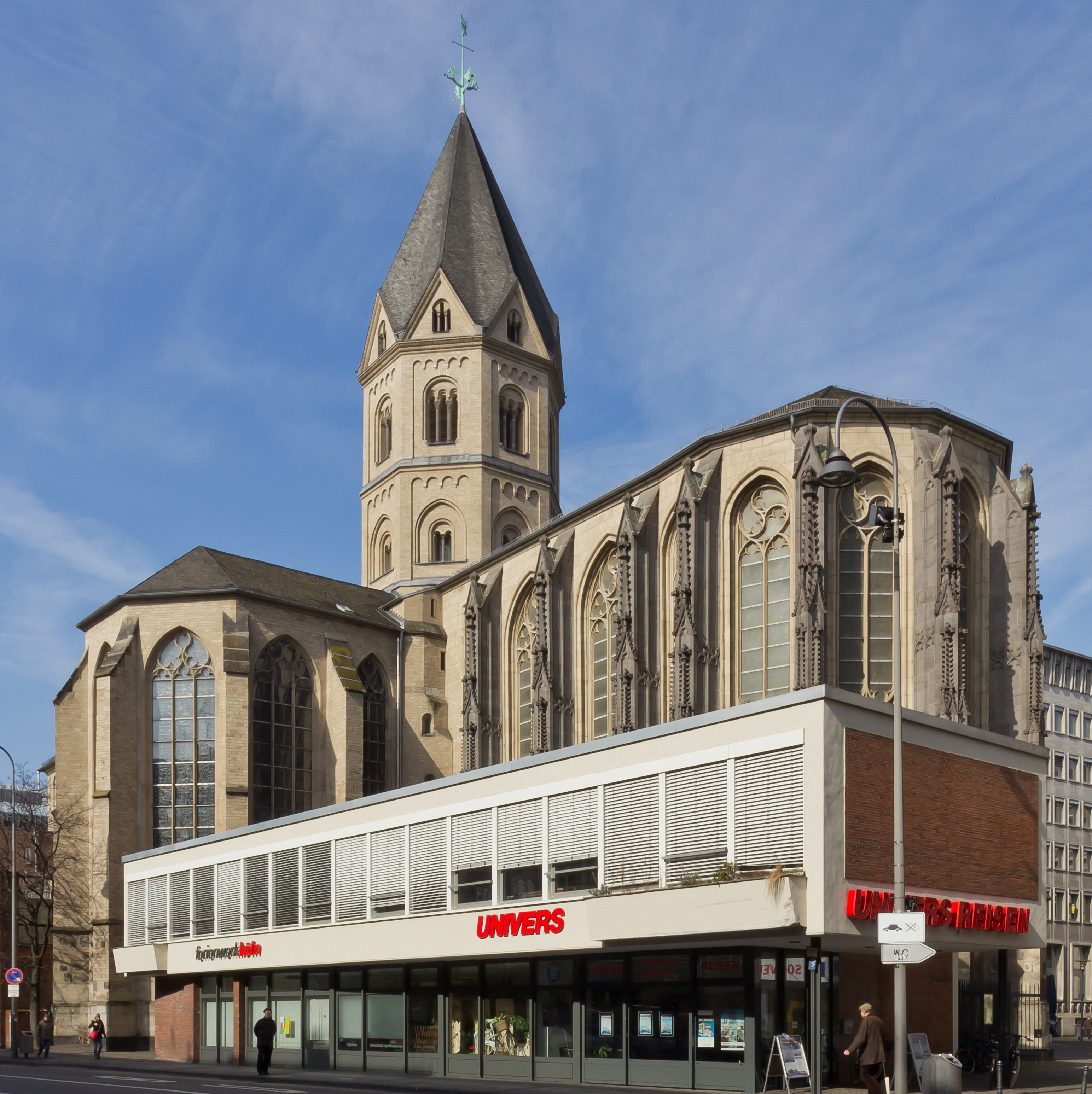 Denkmalgeschütztes Geschäftshaus, Pavillongebäude, Eckgebäude zu Andreaskloster, erbaut für die Sparkasse der Stadt Köln. Architekt: Theodor Kelter und Joachim Schürmann. Baujahr: 1956